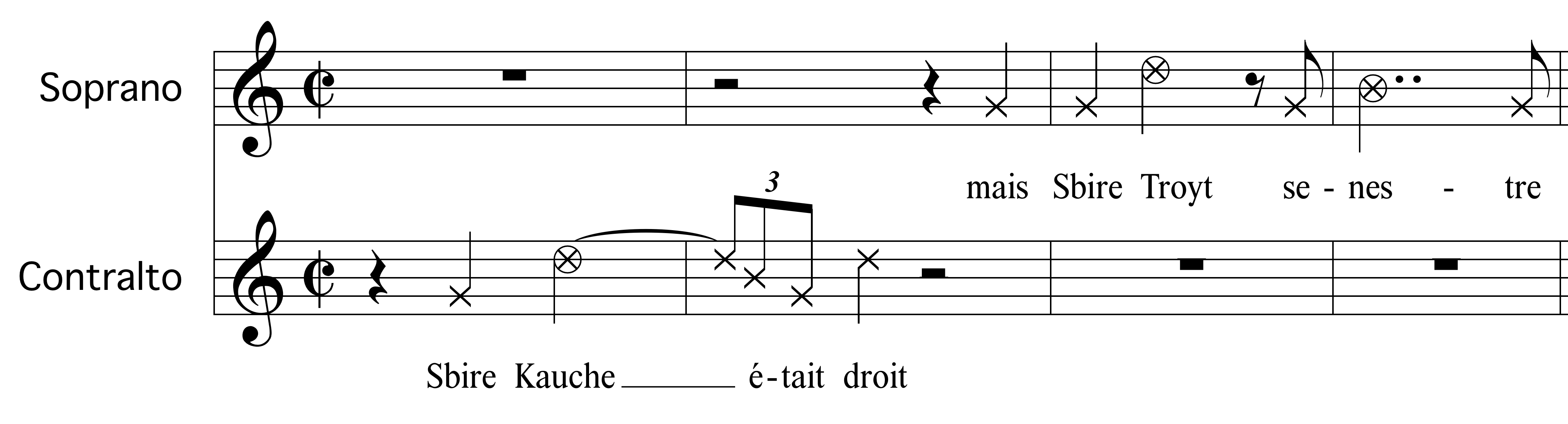 Extrait de la pièce V d'Anna Livia Plurabelle d'André Hodeir